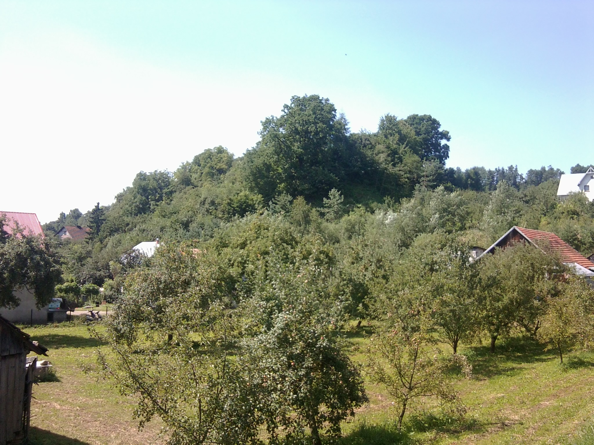 Grodzisko - Grobla w Podegrodziu